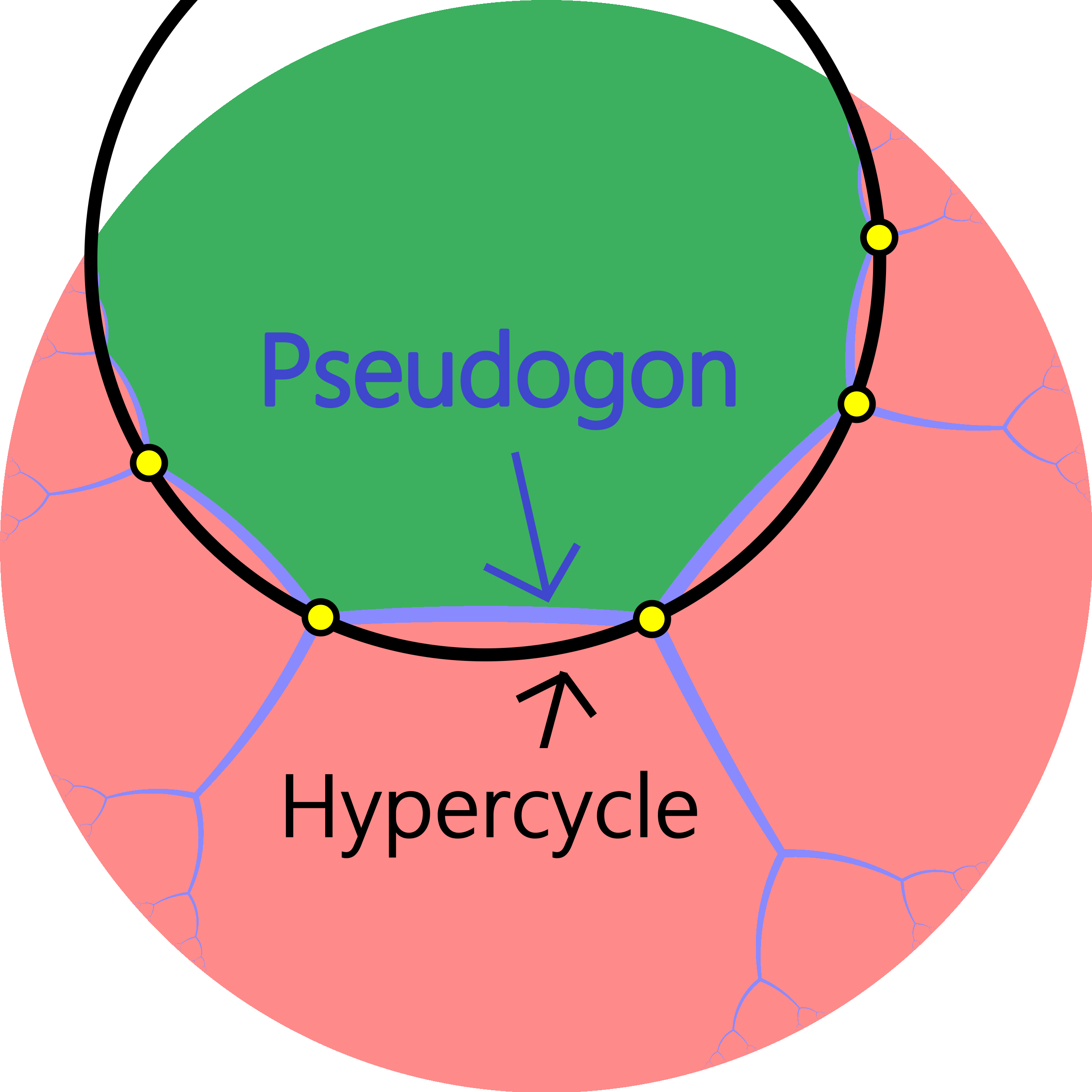 (pseudogon (iπ/λ)，λ=π/9)